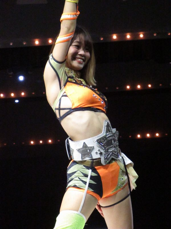 2019年大阪大会より